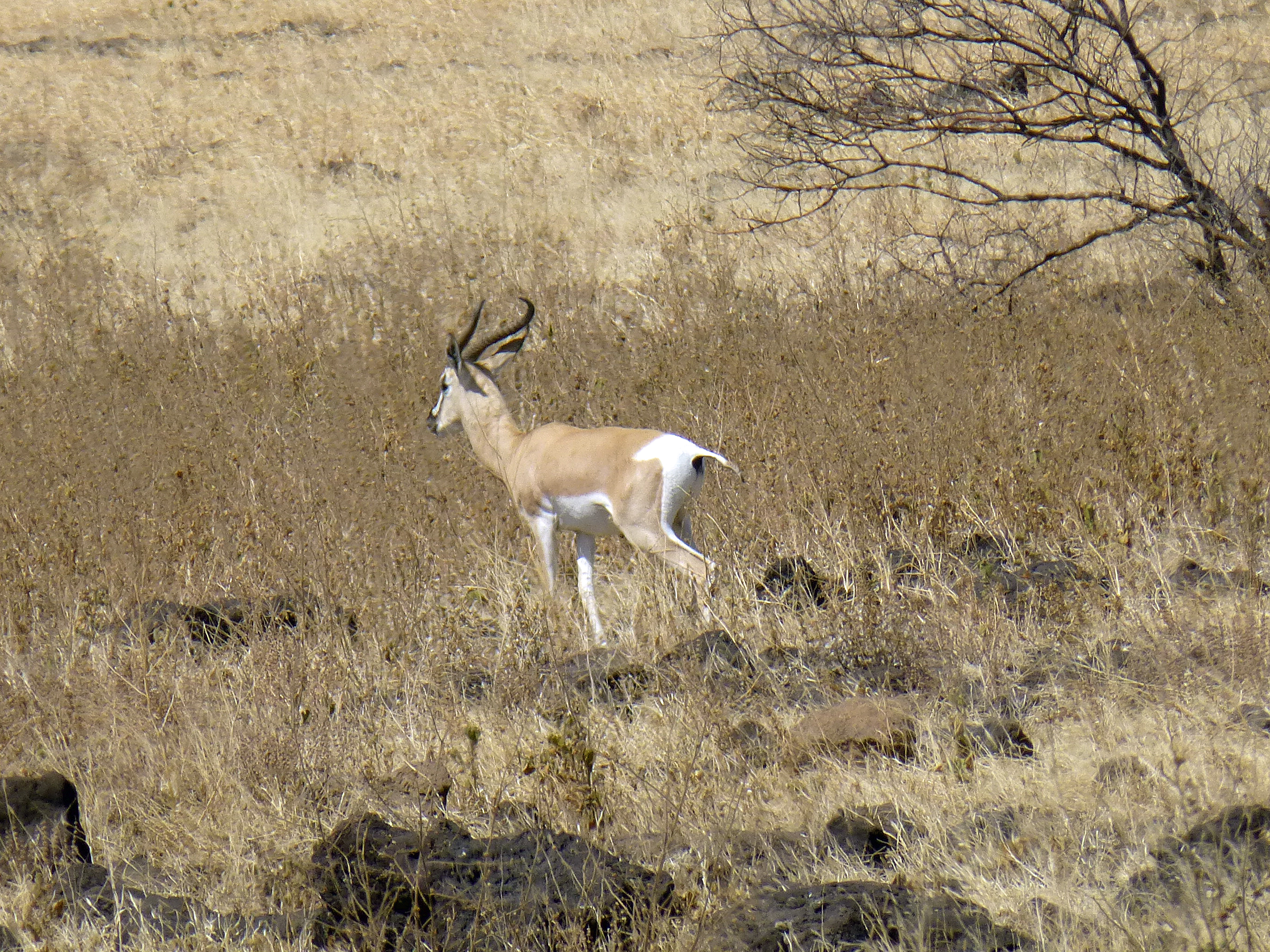 Gazelle de Soemmerring au Parc national de Yangudi Rassa (Ethiopie)